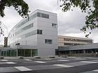 Vorplatz der HTL-Hollabrunn in schwarz-weiß ohne Schüler